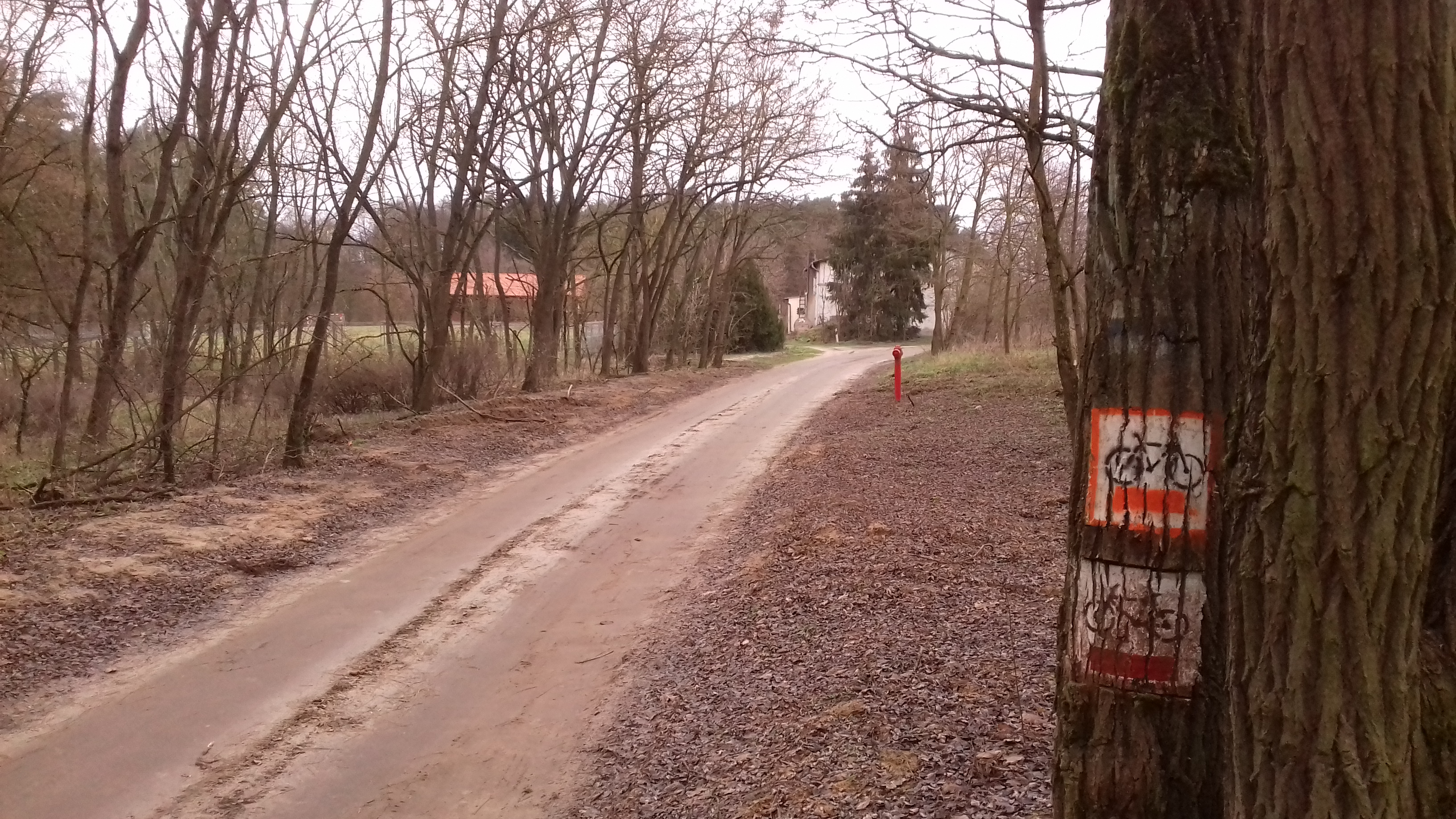 Oznaczenie szlaków turystycznych w Żarnowcu